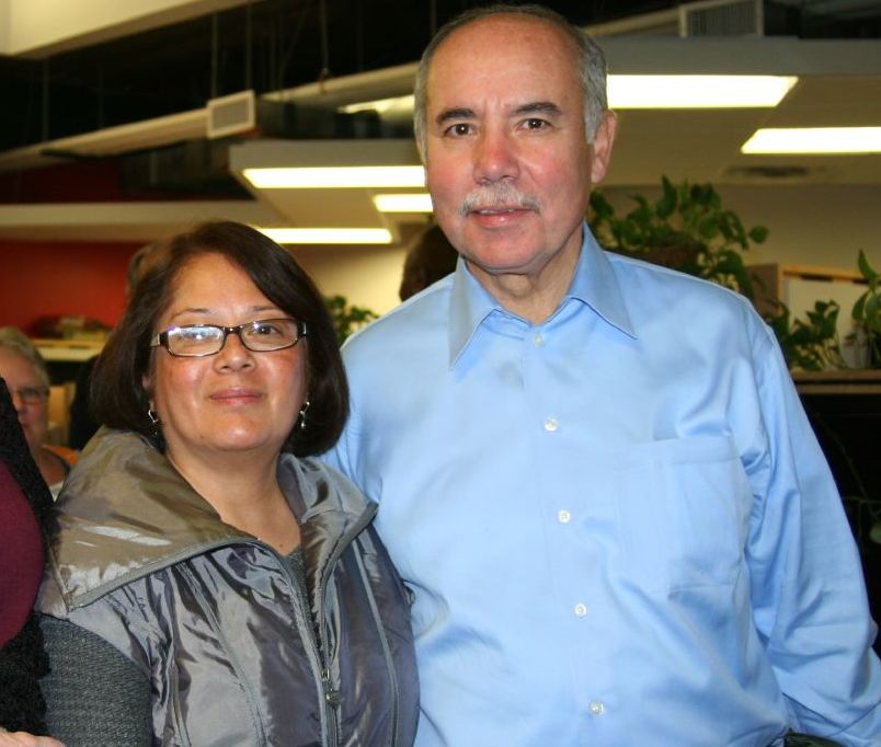 City Clerk Miguel del Valle & Lupe del Valle